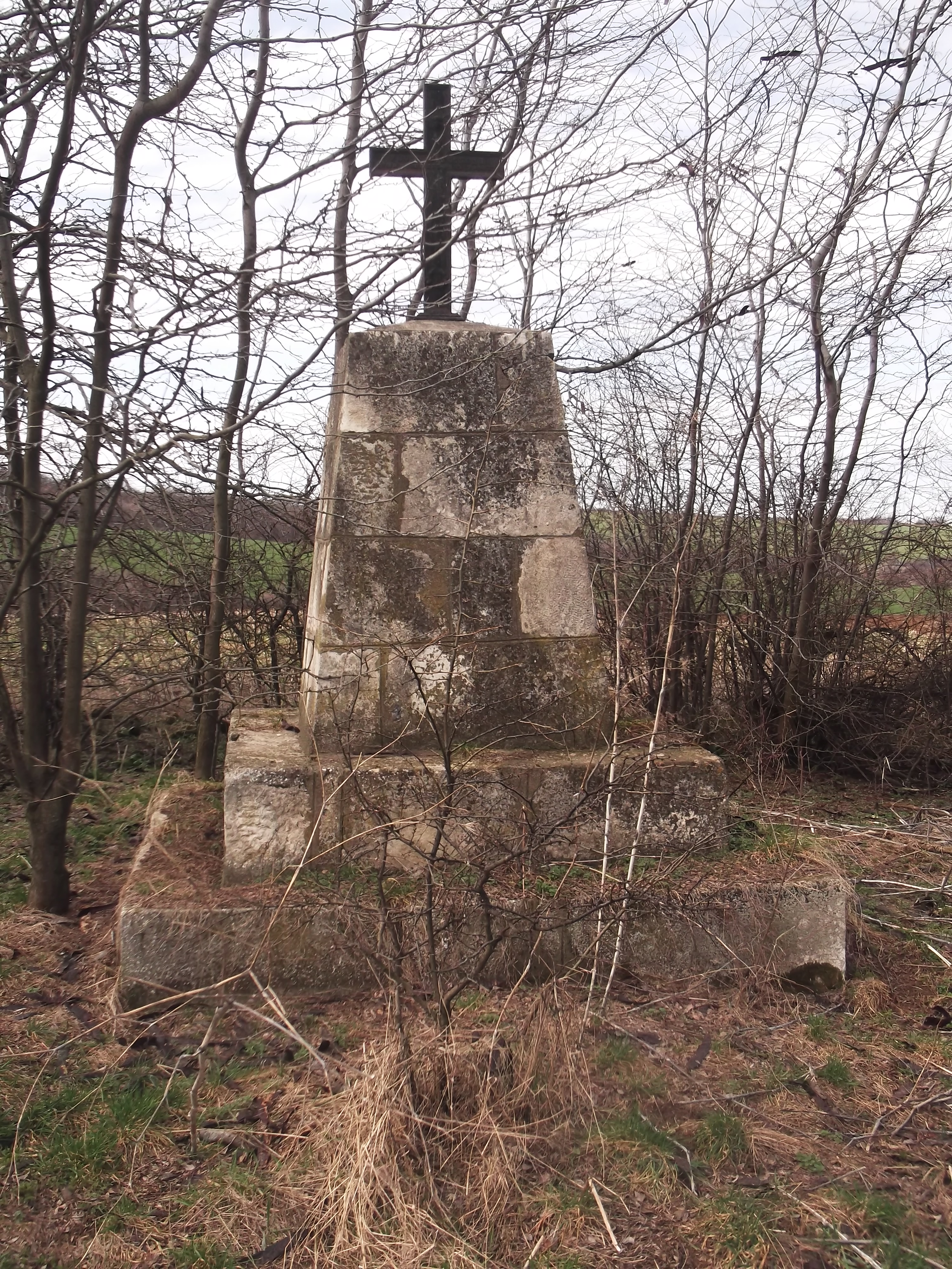 Надгробен паметник на полковник Николай Петрович Шлитер, командир на 17 Архангелогородски пехотен полк, смъртоносно ранен при атаката на "Канлъ табия" (Гривишки редут №2).